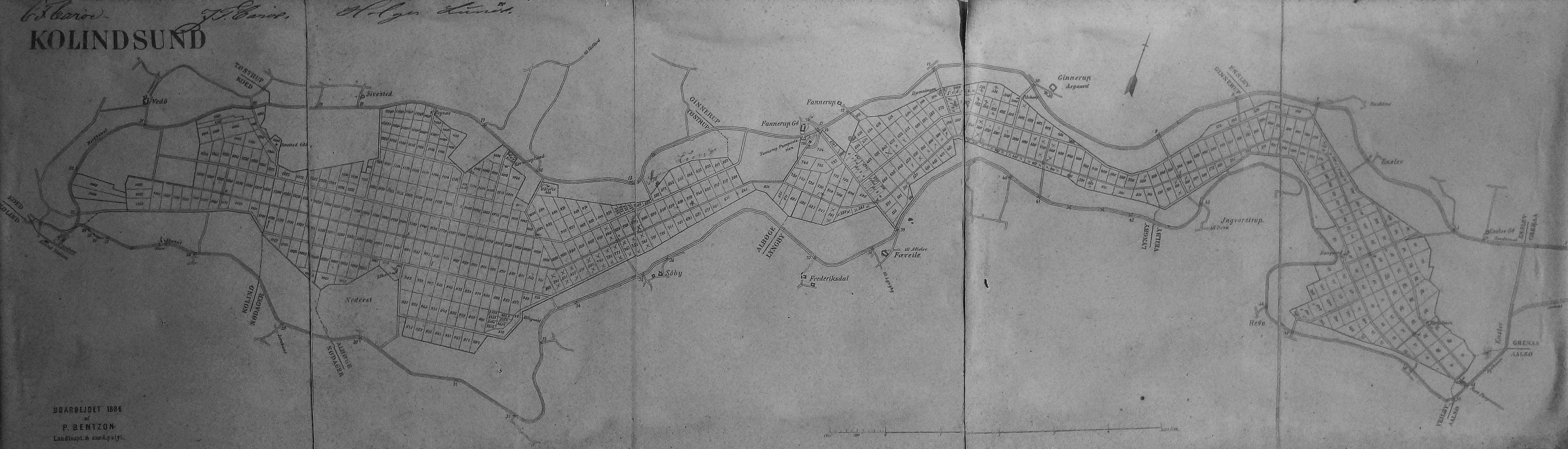 Kolindsund, parcelkort